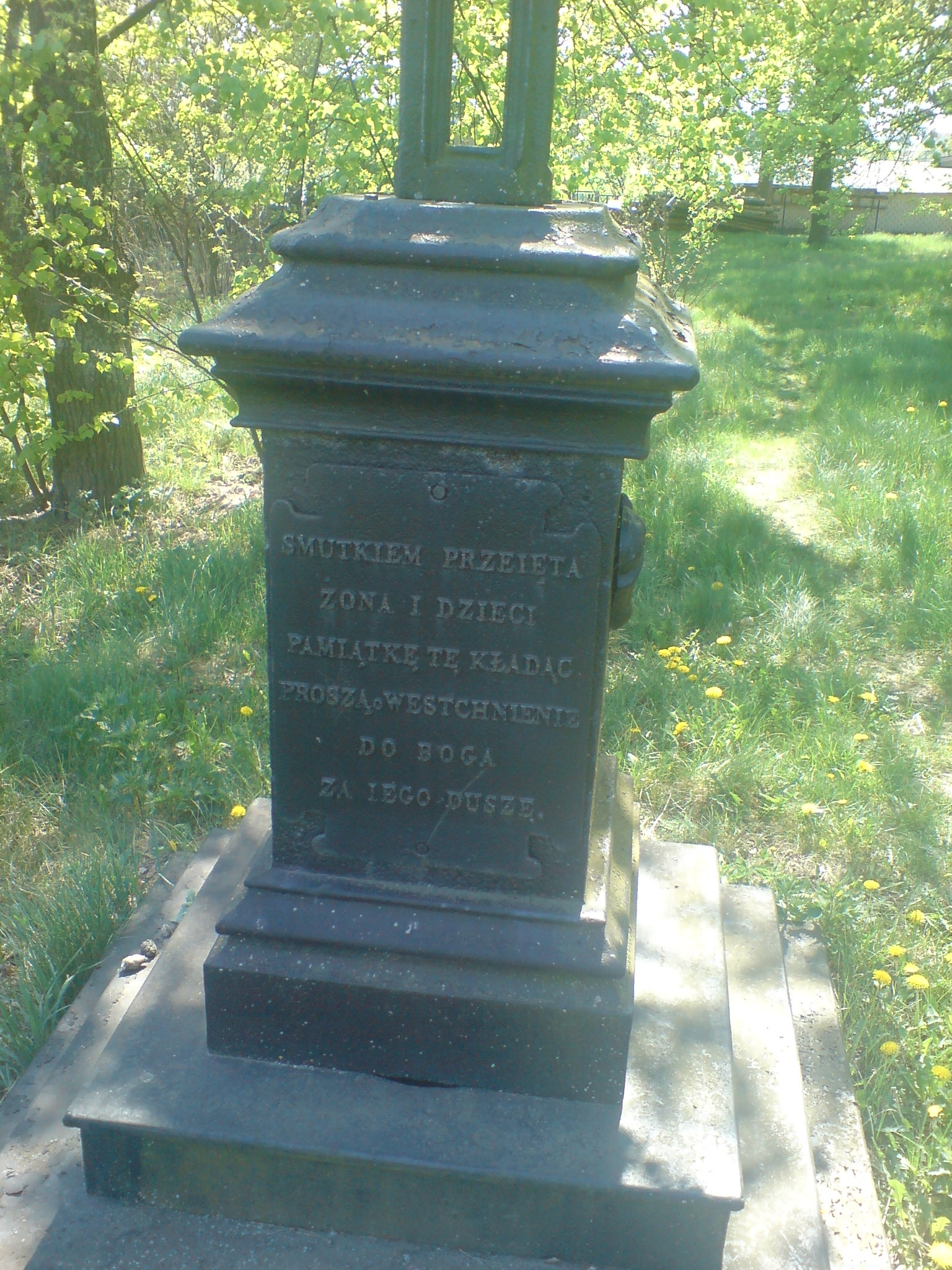 Tablica nagrobna z poł. XIX w.